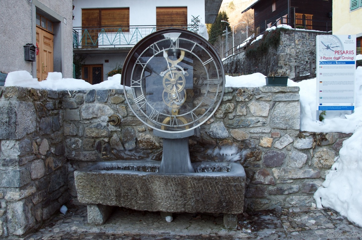 Furlan: Orloi a aghe cul sisteme "bascule", in mostre permanent